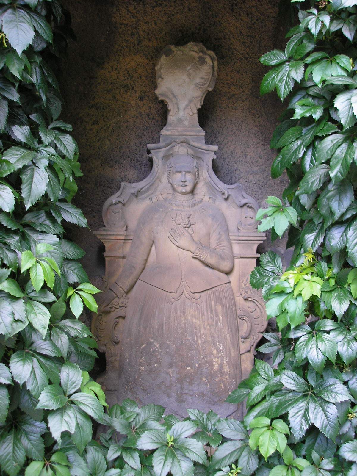 Eine Grabplatte (?) an der Kirche von Kerspleben bei Erfurt.